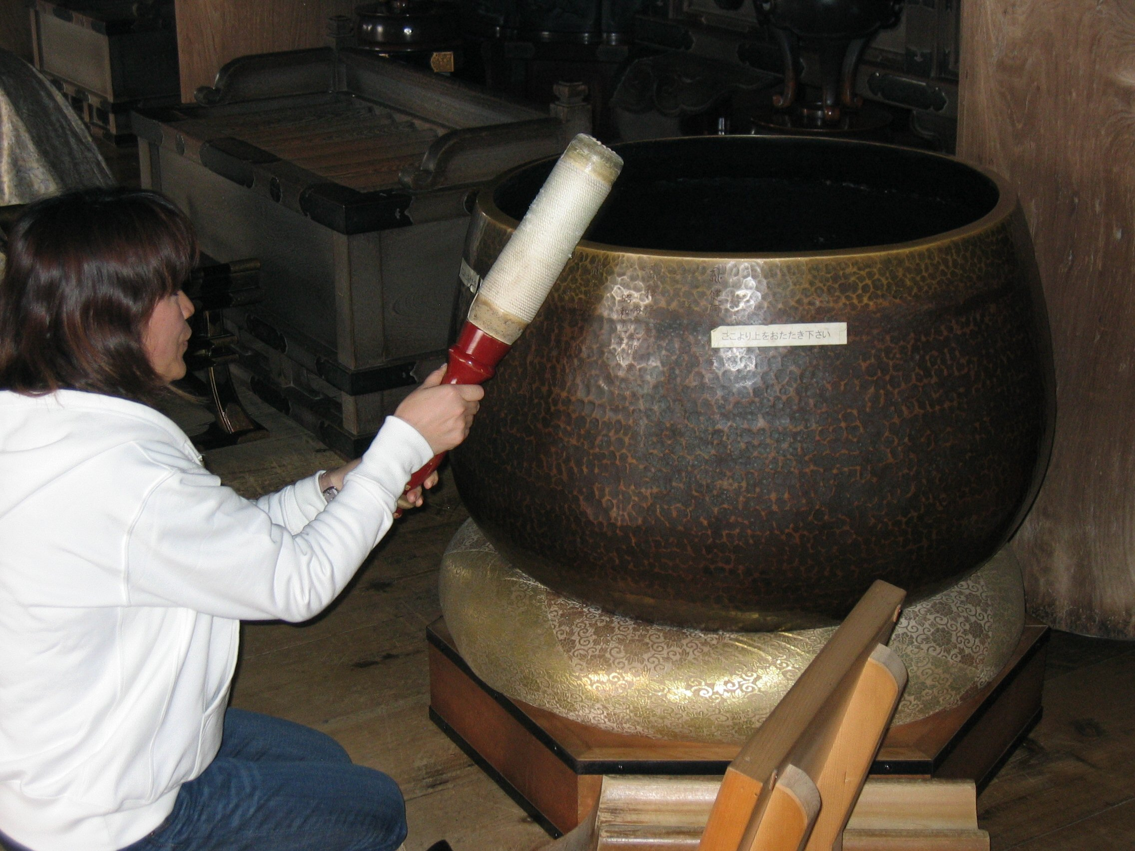 Rin gong at Kiyomizu-dera, Kyoto